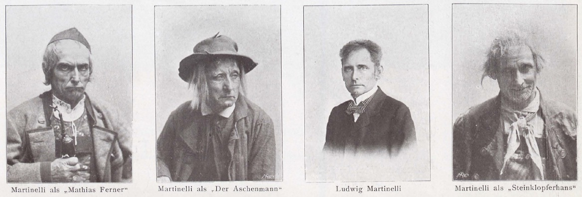 Porträt und Rollenbilder des österreichischen Schauspielers Ludwig Martinelli (1832-1913).